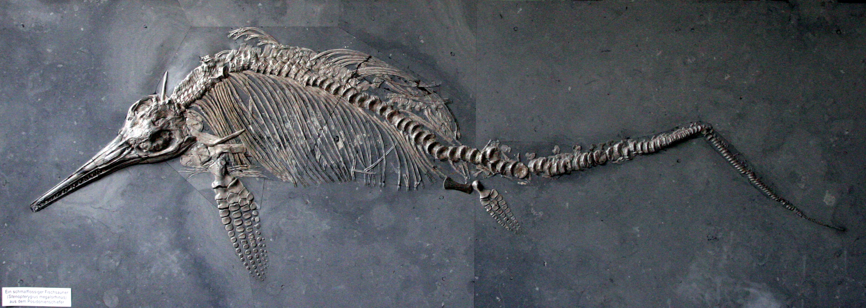 Ein schmalflossiger Fischsaurier (Stenopterygius megalorhinus) aus dem Posidonienschiefer. Das Fossil befindet sich im Museum des Institutes für Geowissenschaften an der Ruprecht-Karls-Universität in Heidelberg (Im Neuenheimer Feld 234) [1]